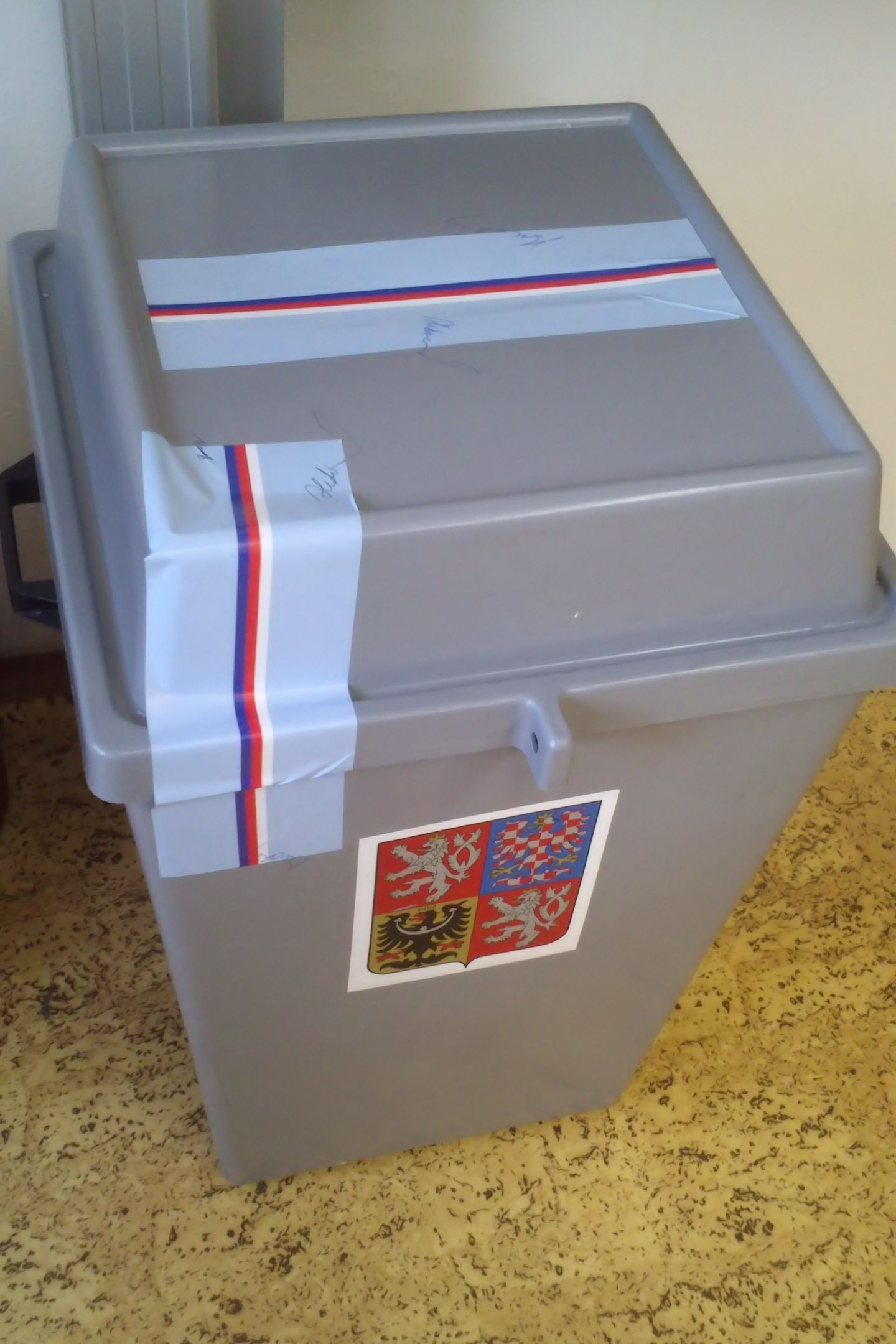 Volební urna při komunálních volbách v Brně 2014